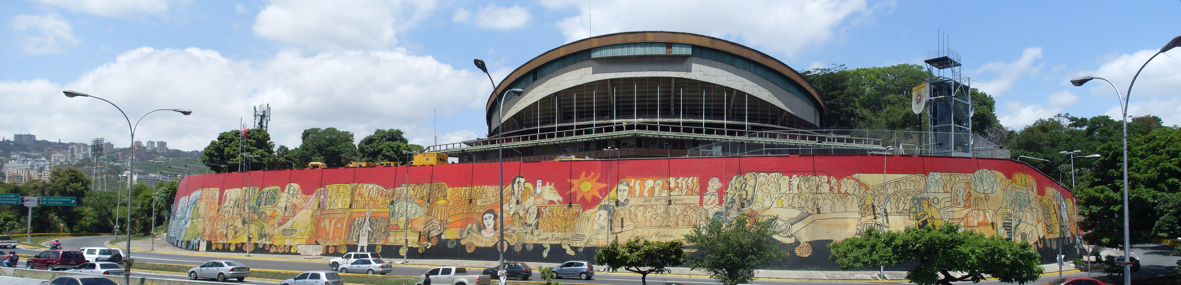 Mural de Pedro León Zapata. Título: Los Constructores de Venezuela. Autor: Pedro León Zapata. Año: 1999. Ubicación: Autopista Francisco Fajardo. Universidad Central de Venezuela, por la entrada de la Plaza Venezuela. La imagen es una composición fotográfica hecha con fotos individuales que fueron unidas con el programa Hugin Panorama Stitcher.